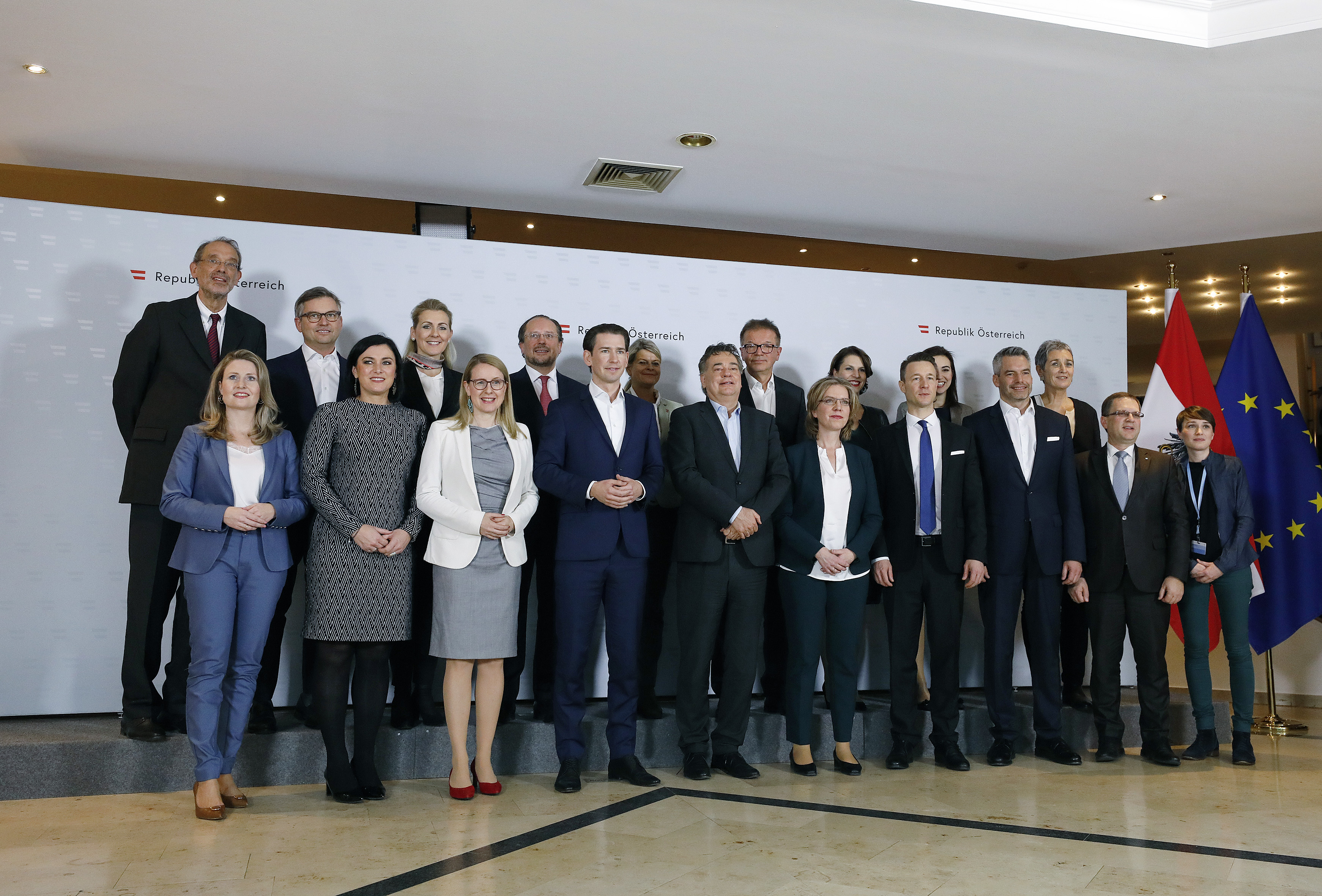 Regierungsklausur Krems. 29.01.2020, Foto: Dragan Tatic